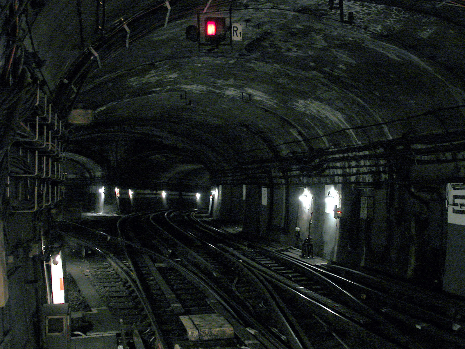 Station Place Monge, de la ligne 7 du métro de Paris, France. Raccordement vers la ligne 10.